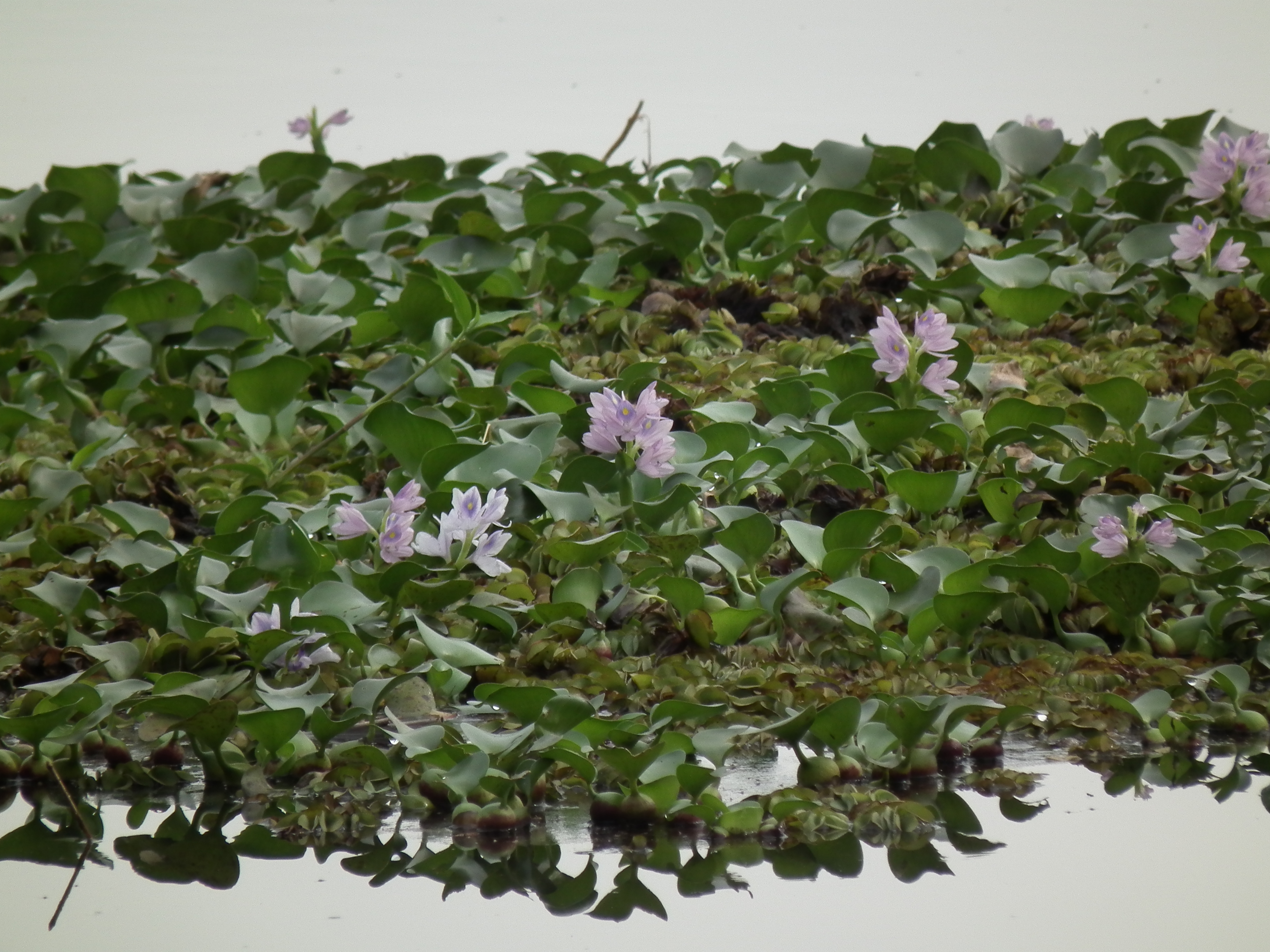 Jacinto-de-Água_Origem: América do Sul, na bacia Amazónica. É considerada uma das piores espécies invasoras em todo o mundo.